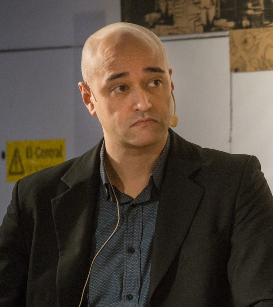 Samtal efter kortpjäsen Presskonferensen av Harold Pinter på Stadsteatern Forum/Debatt i Stockholm med Thord Eriksson, Ola Wong, Cecilia Hansson, Elisabeth Ohlson Wallin , Gertrud Larsson och Lars Amréus.